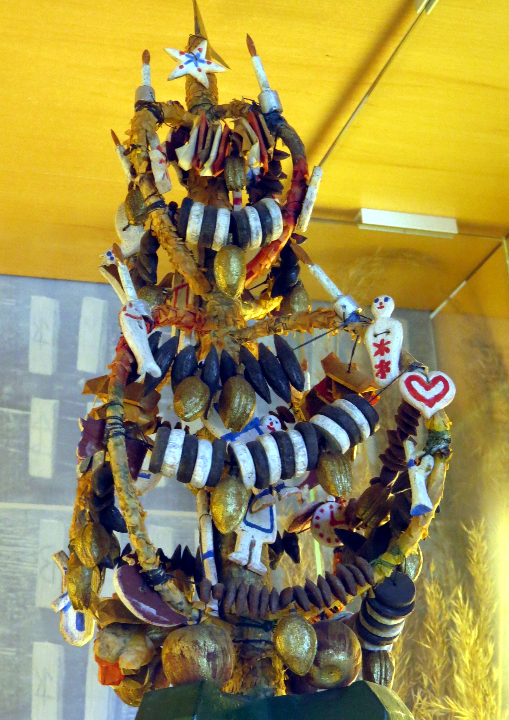 Hiddenseer Bügelbaum, Exponat im Heimatmuseum Kloster